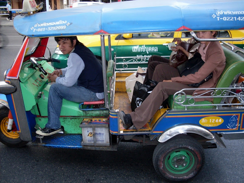 Bangkok Tuk Tuk